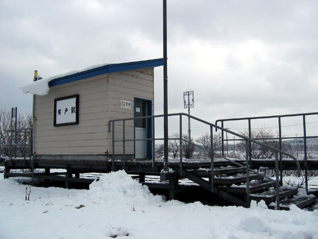 有戸駅外観